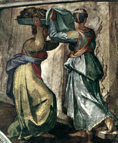 Judith and Holofernes (Detail), Fresko von Michelangelo in der Sixtinischen Kapelle im Vatikan (1509)